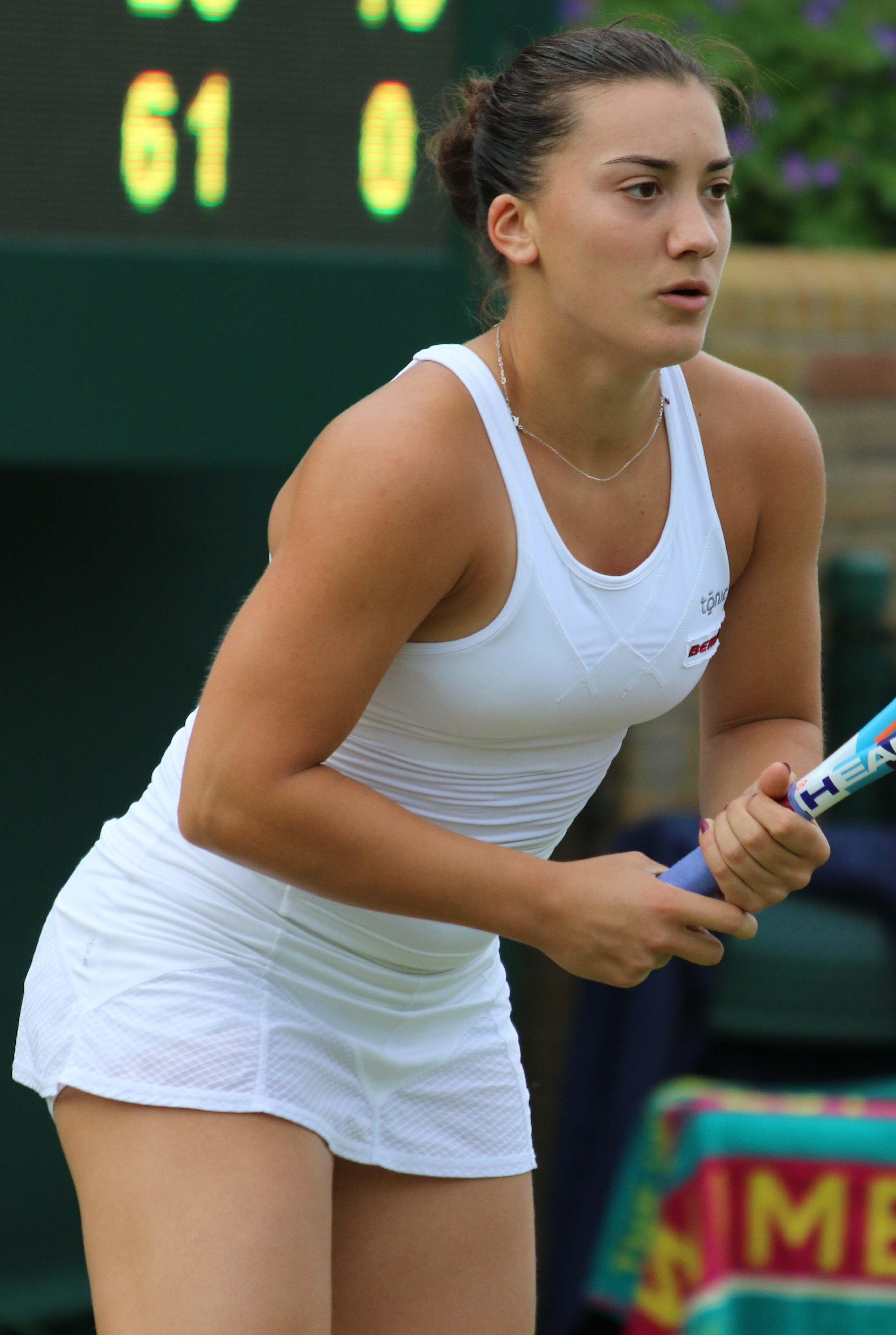 Kovinic WM16 (10)